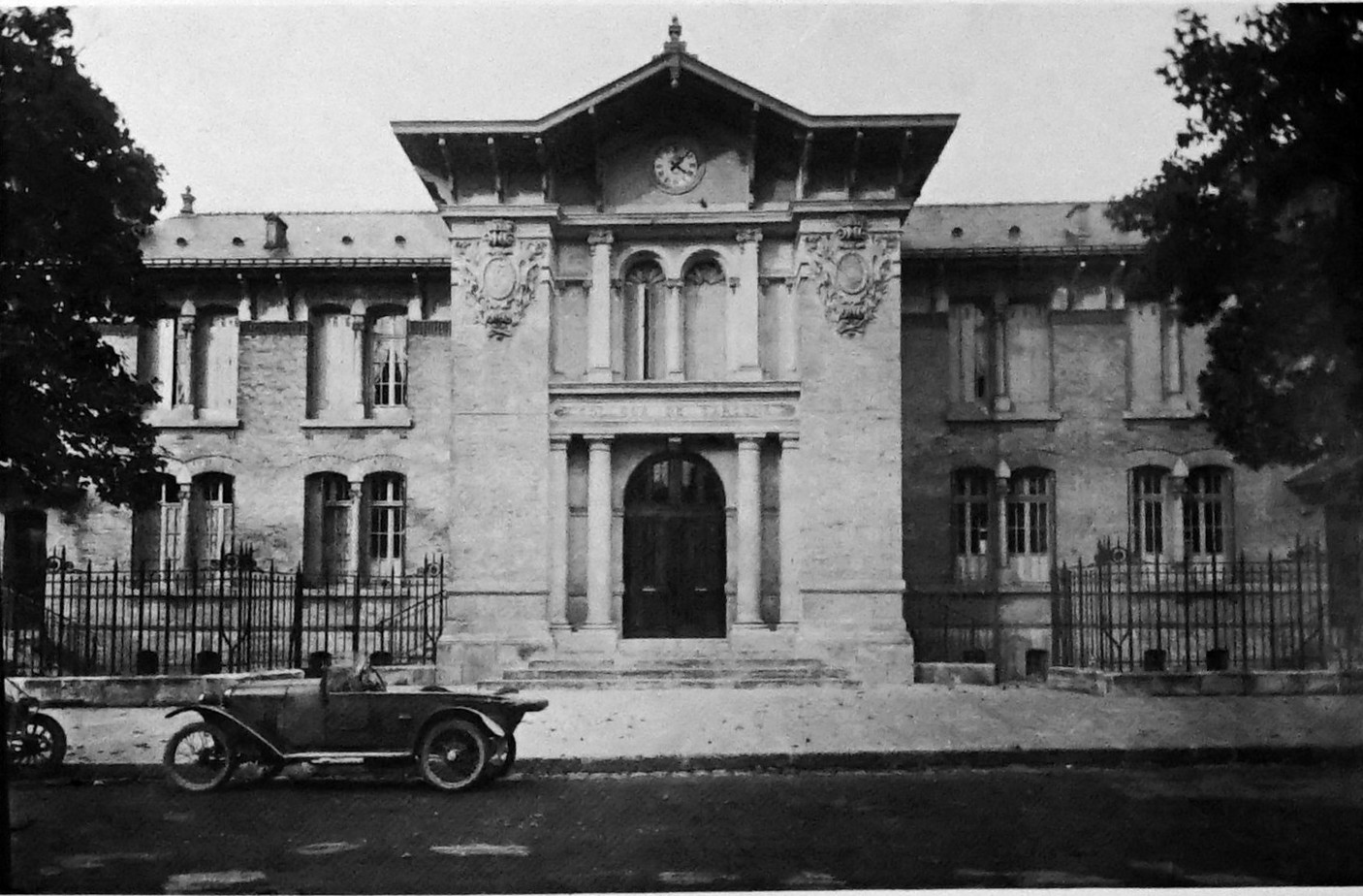 sur une vue ancienne.